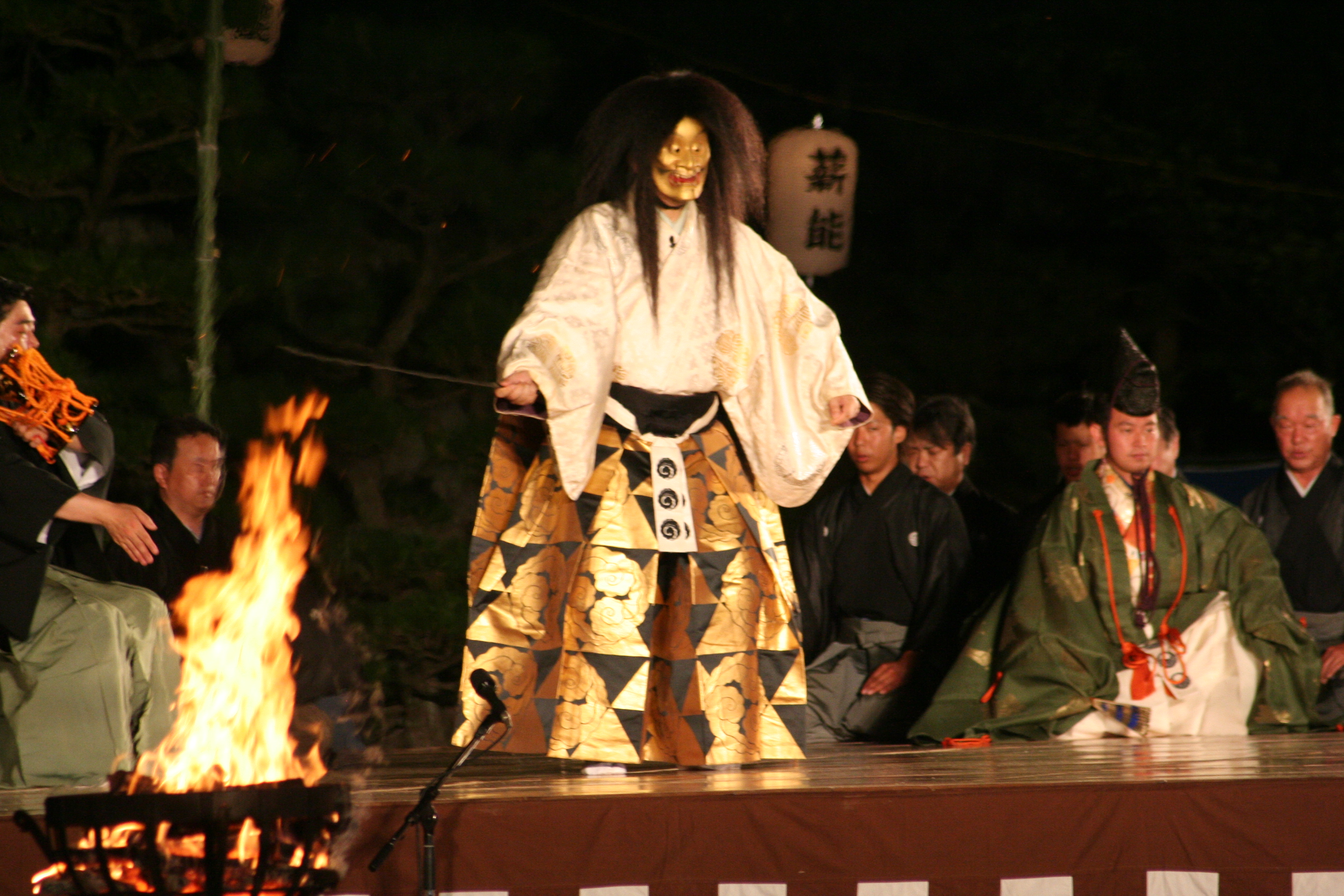 2009年7月31日に姫路城三の丸広場で行なわれた姫路薪能の様子。